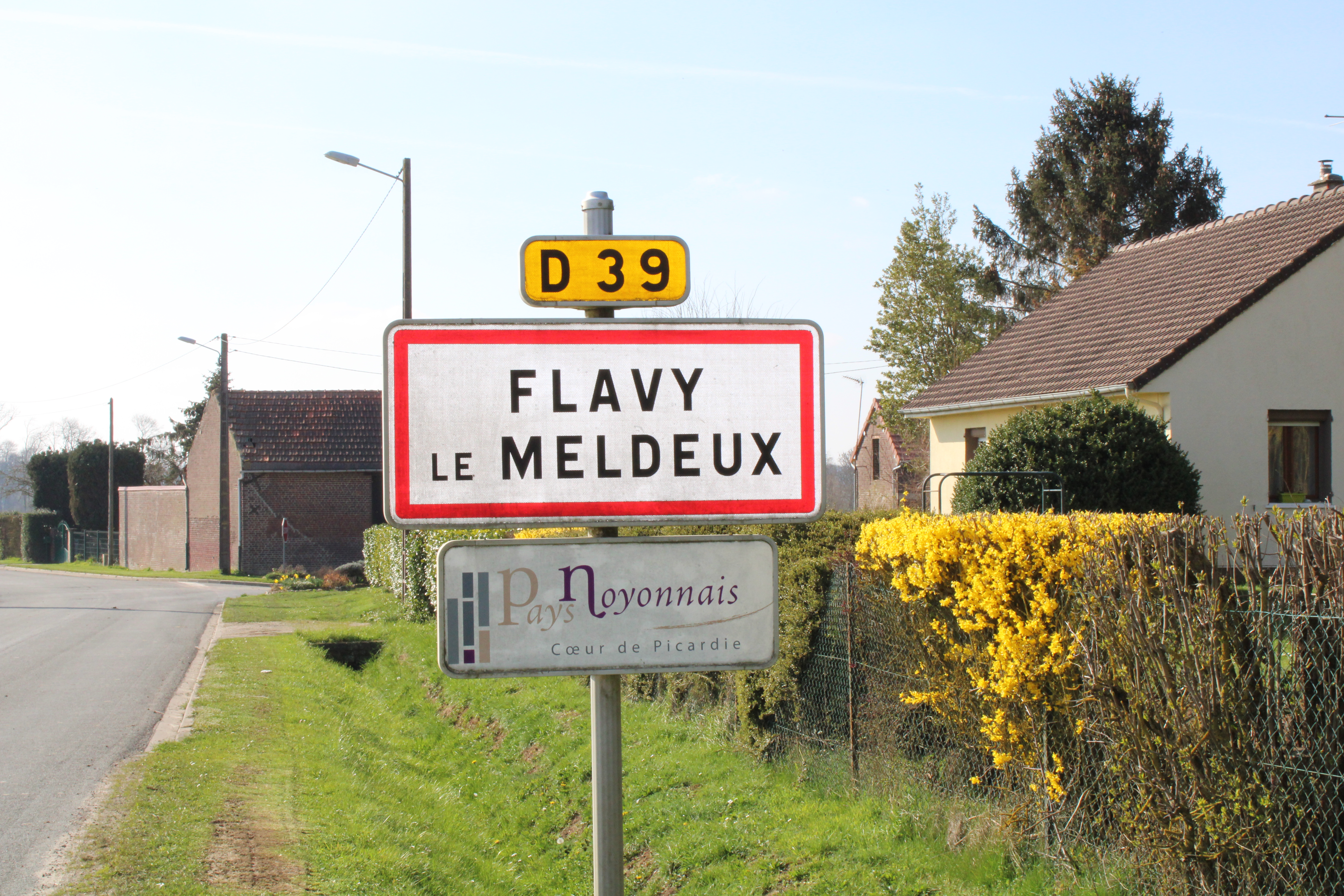 Entrée du village.